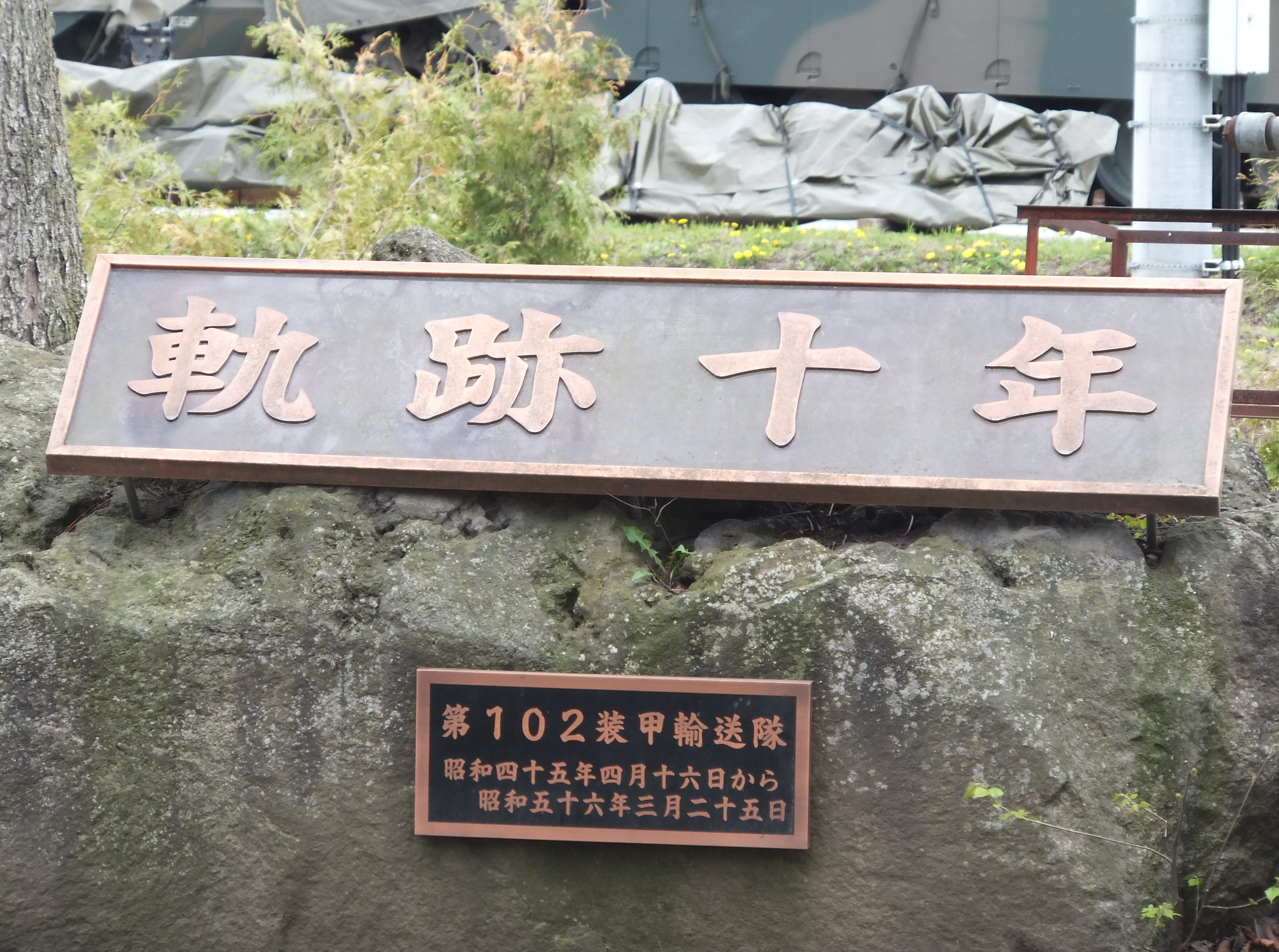 第102装甲輸送隊の記念碑 上富良野にて撮影